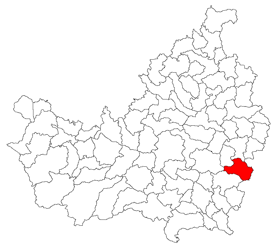 Categorie:Hărţi ale judeţului Cluj